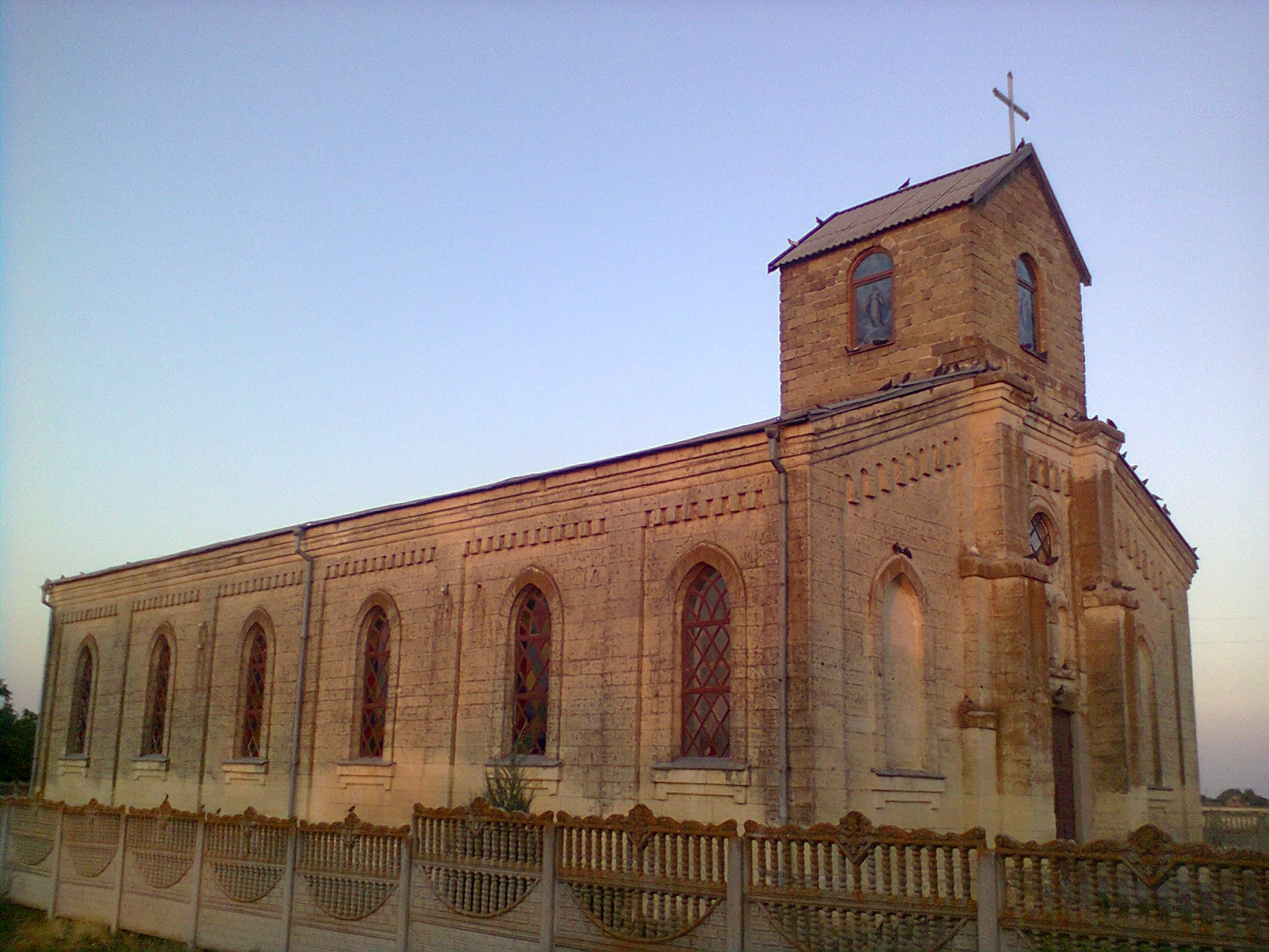 Костел Внебовзяття Пресвятої Діви Марії, знаходиться в селі Новопетрівка, побудовано на початку 20 століття та відновлено на початку 21 століття.